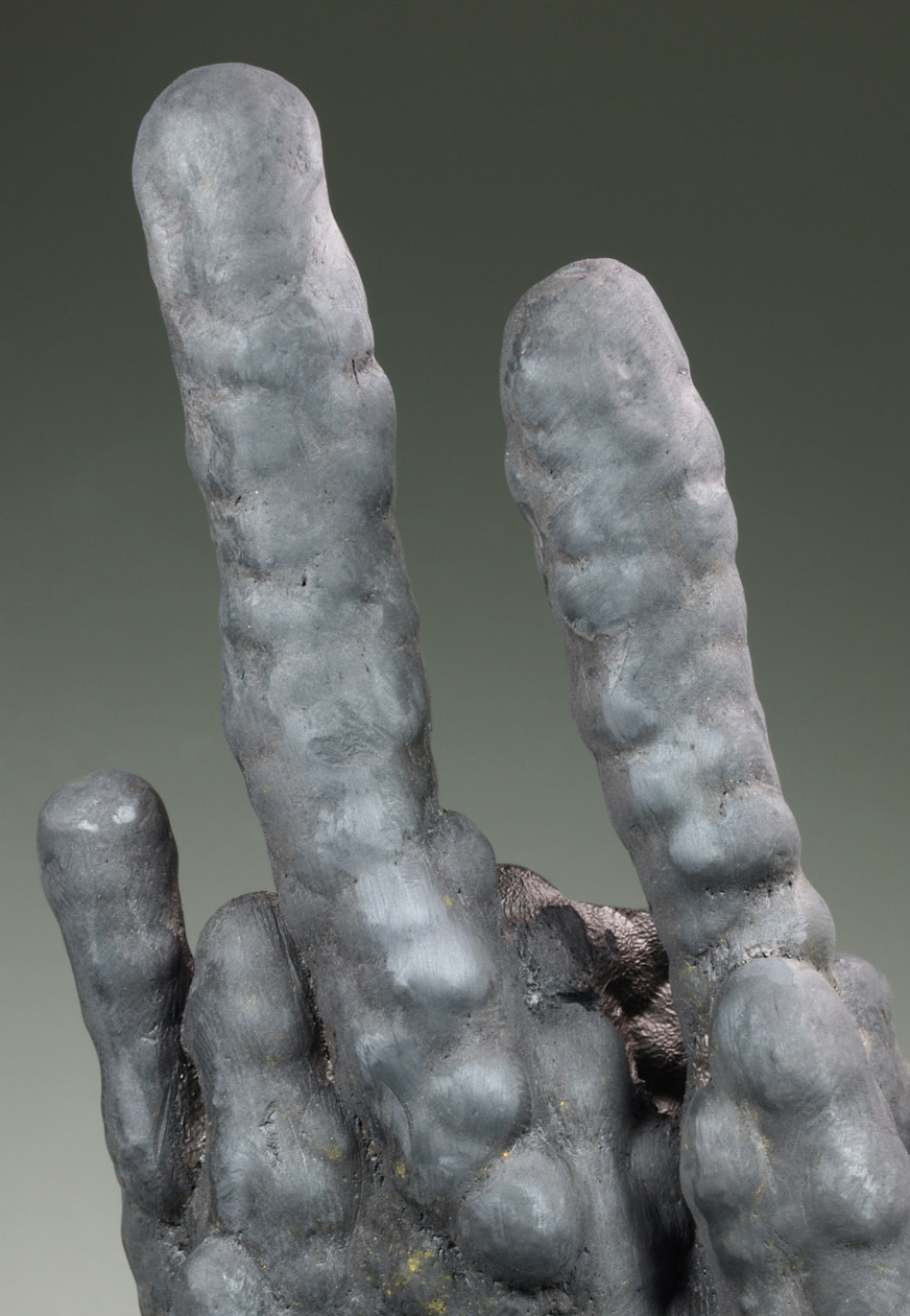 Excelente ejemplar estalactítico de coronadita, analizado por SEM-EDS, con formas redondeadas, de intenso color gris casi negro. Buen tamaño. De esta localidad clásica para la mineralogía marroquí. Con una matriz de limonita. Pueden consultar más datos de esta especie y localidad en el blog de Rosell Minerals. Localidad: Taouz area, Filon 12, Taouz, Er Rachidia, Meknès-Tafilalet, Marruecos Medidas: 10.8 x 6 x 3.5 cm.